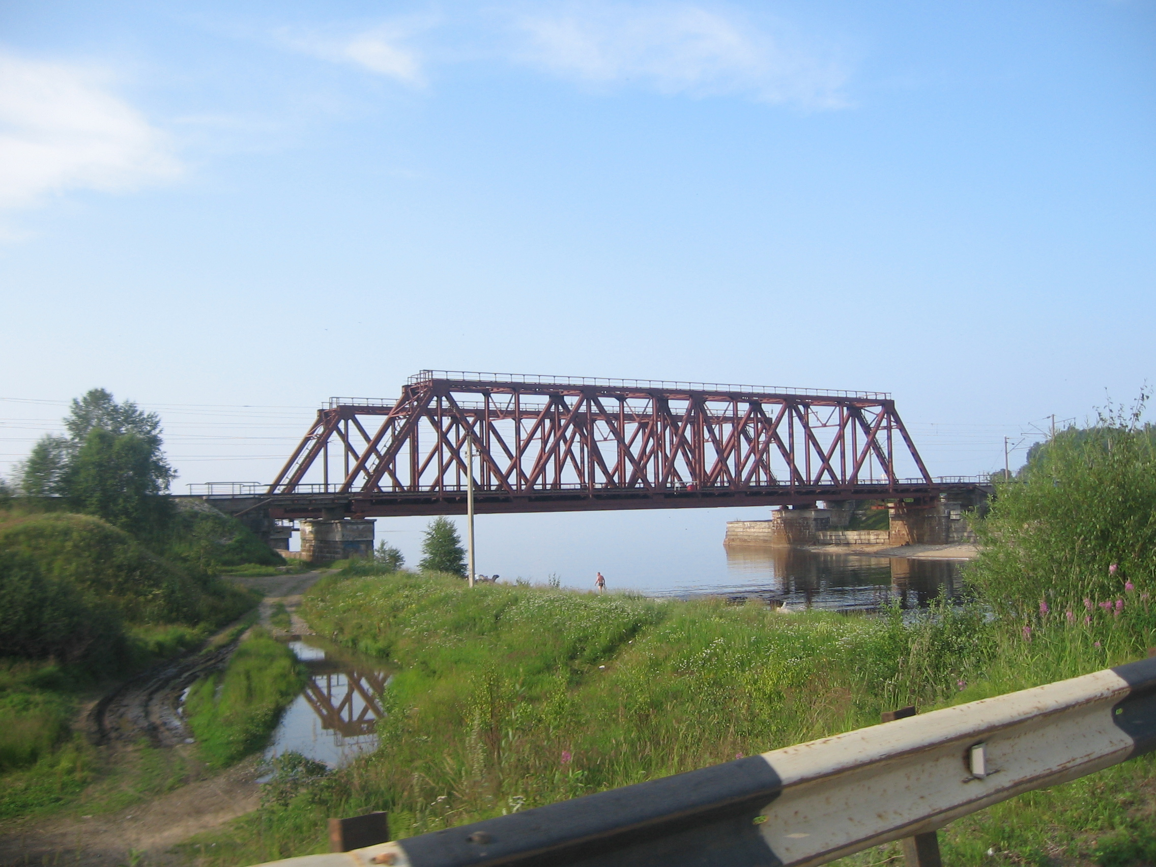 Транссиб,река впадает в Байкал